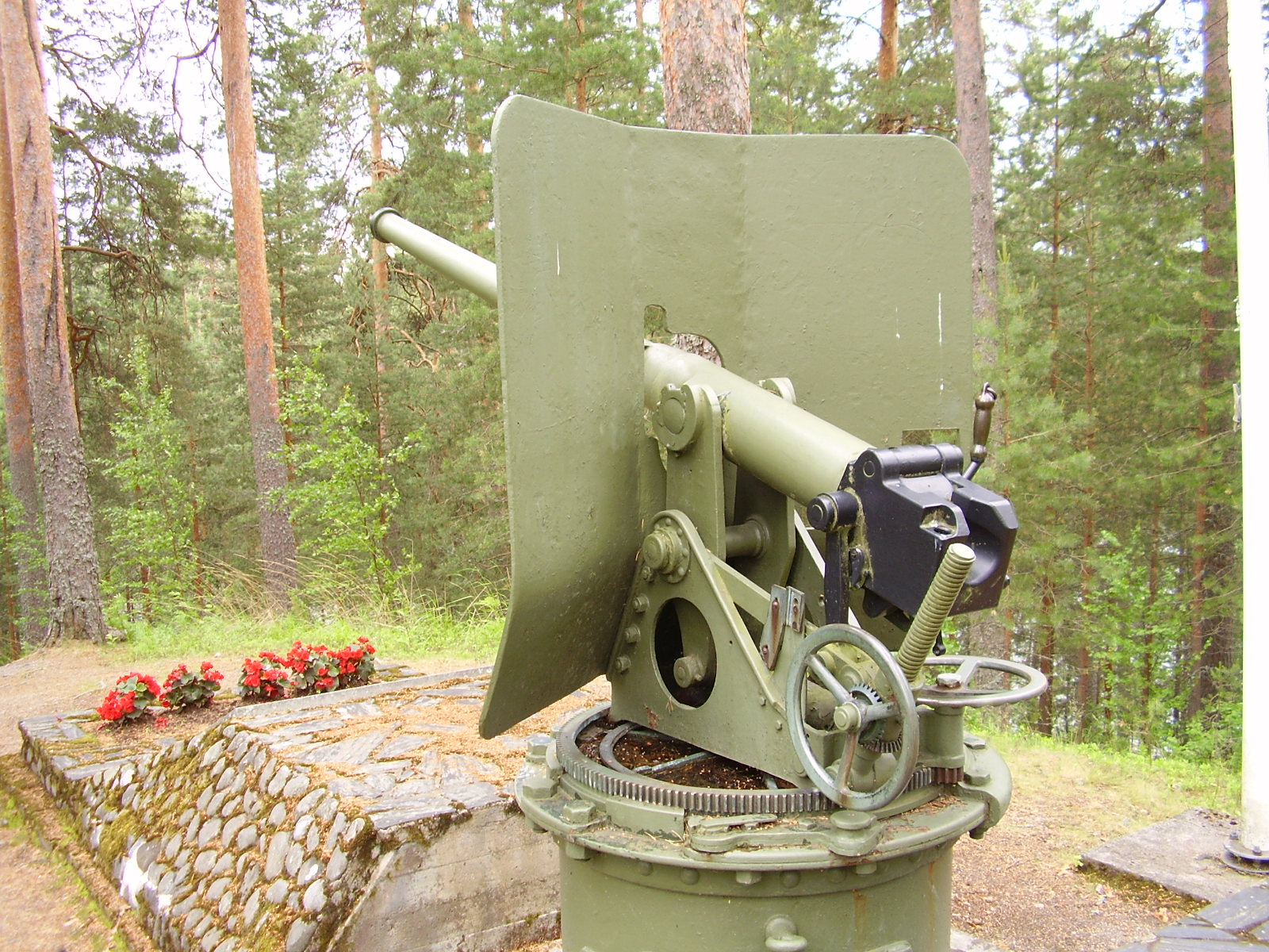 It-tykki Parikkalanmäellä.